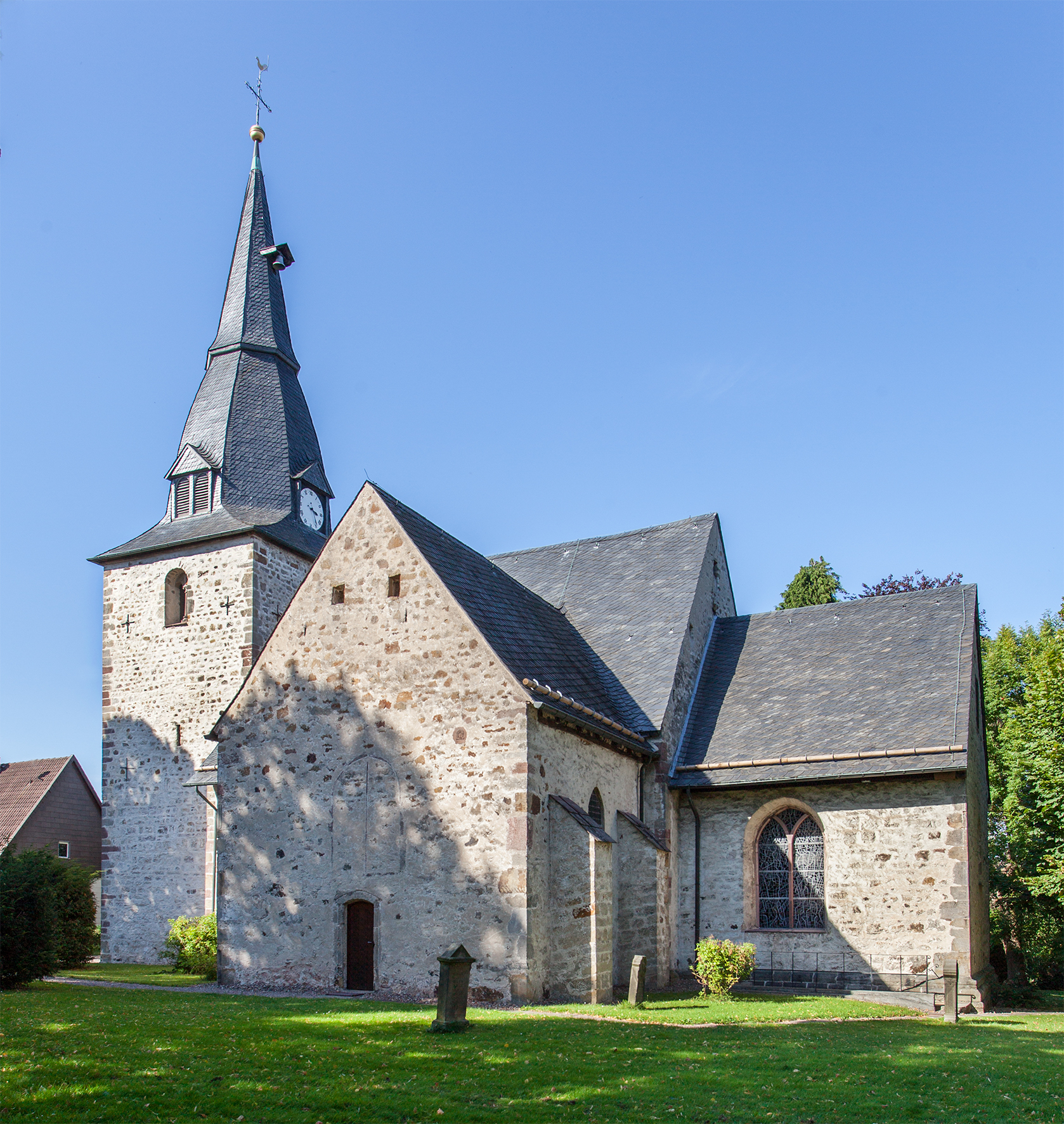 Evangelische Kirche Reelkirchen (Blomberg)This is a photograph of an architectural monument.